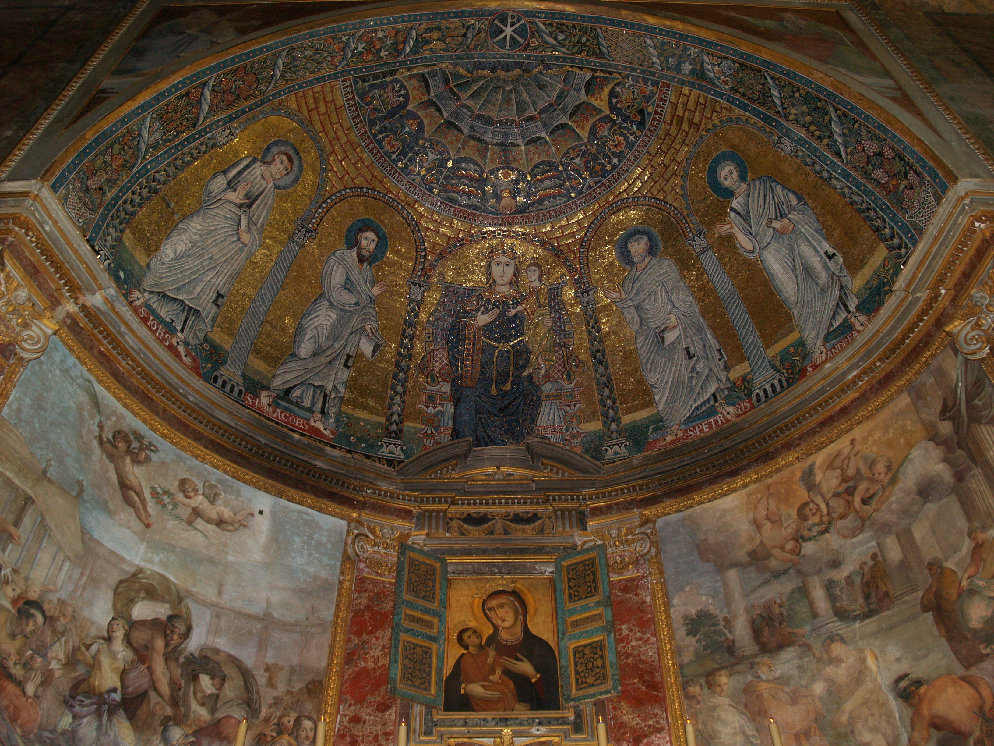 Roma. Santa Francesca Romana. Interior. Mosaico del ábside.